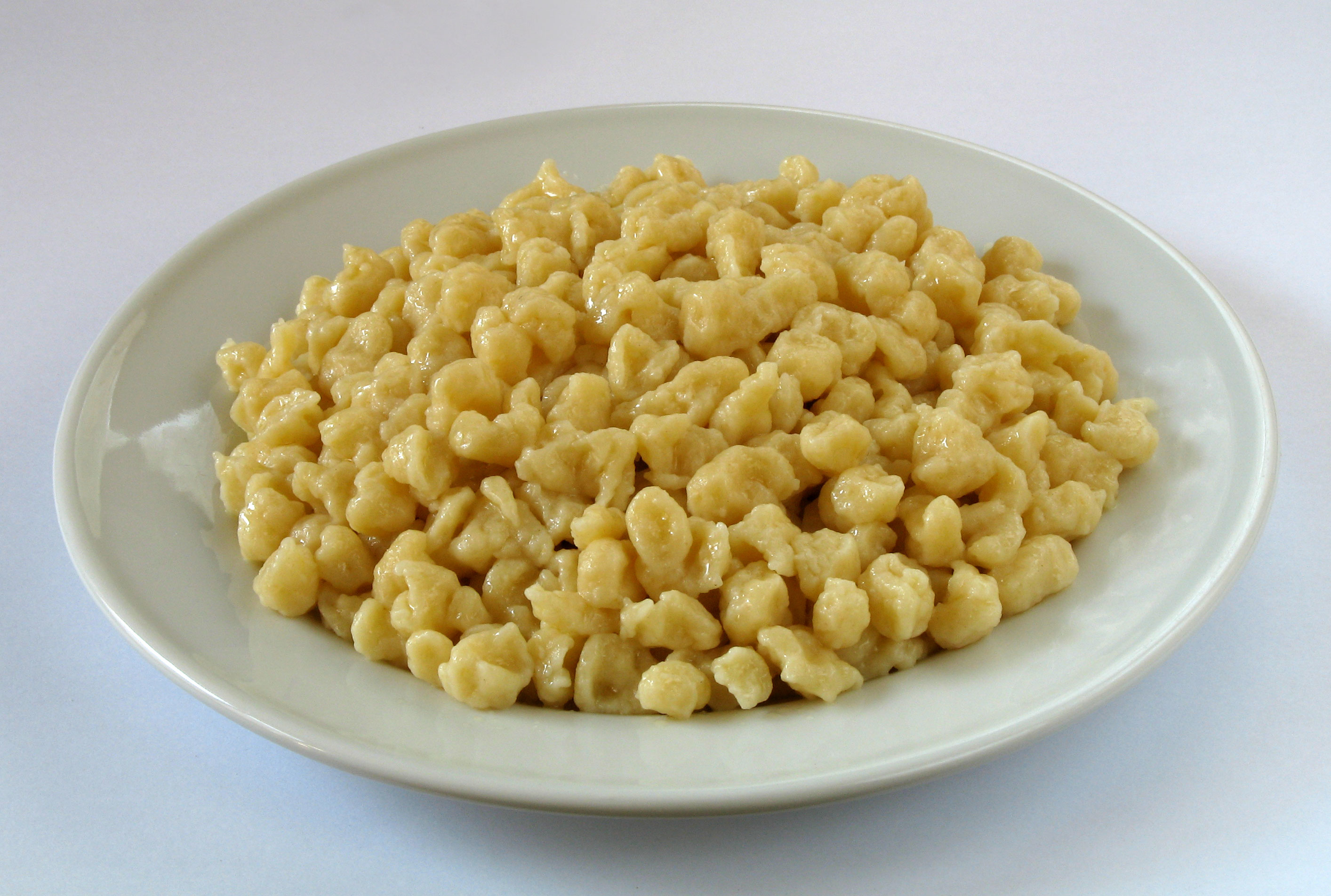 Spätzle, hergestellt mit Spätzlehobel